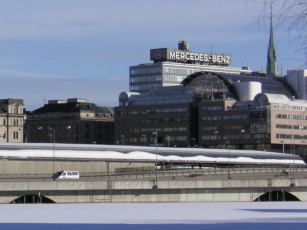 Vasahuset, Stockholm även kallad Mercedes-Benzhus